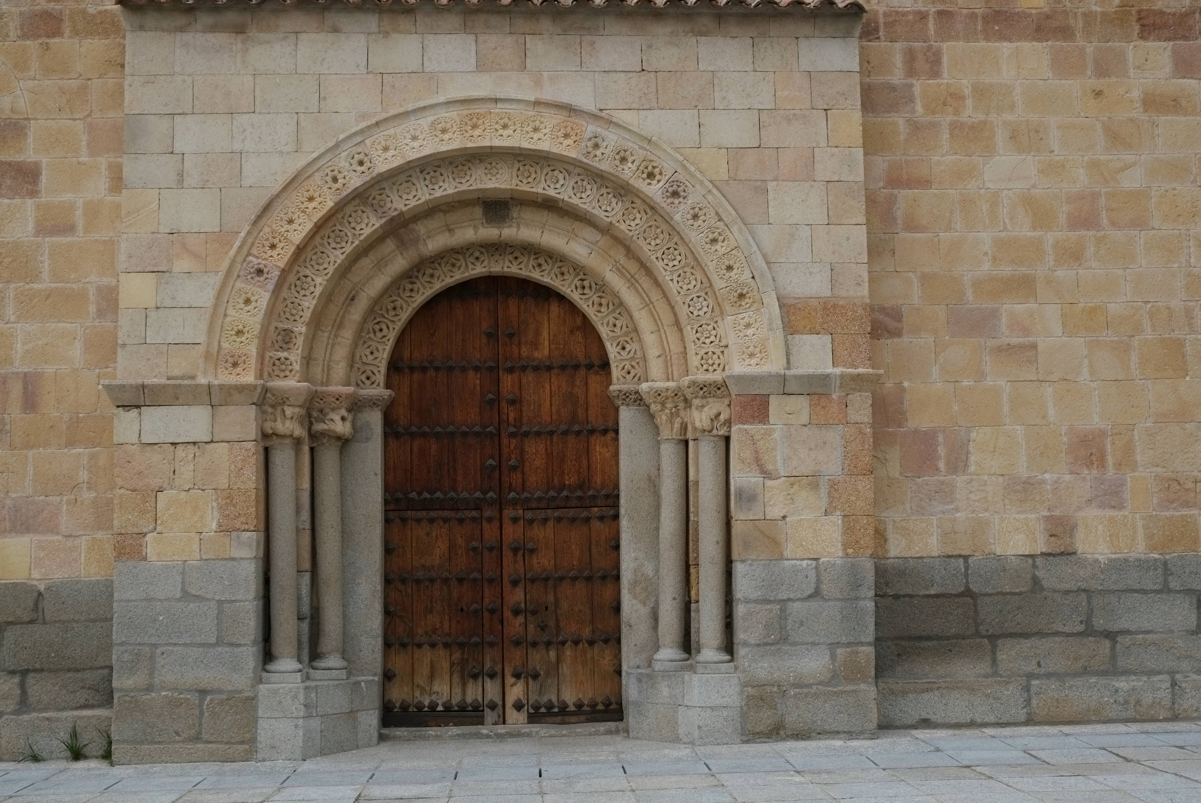 Kirche San Andrés in Ávila (Kastilien-León/Spanien), Südportal